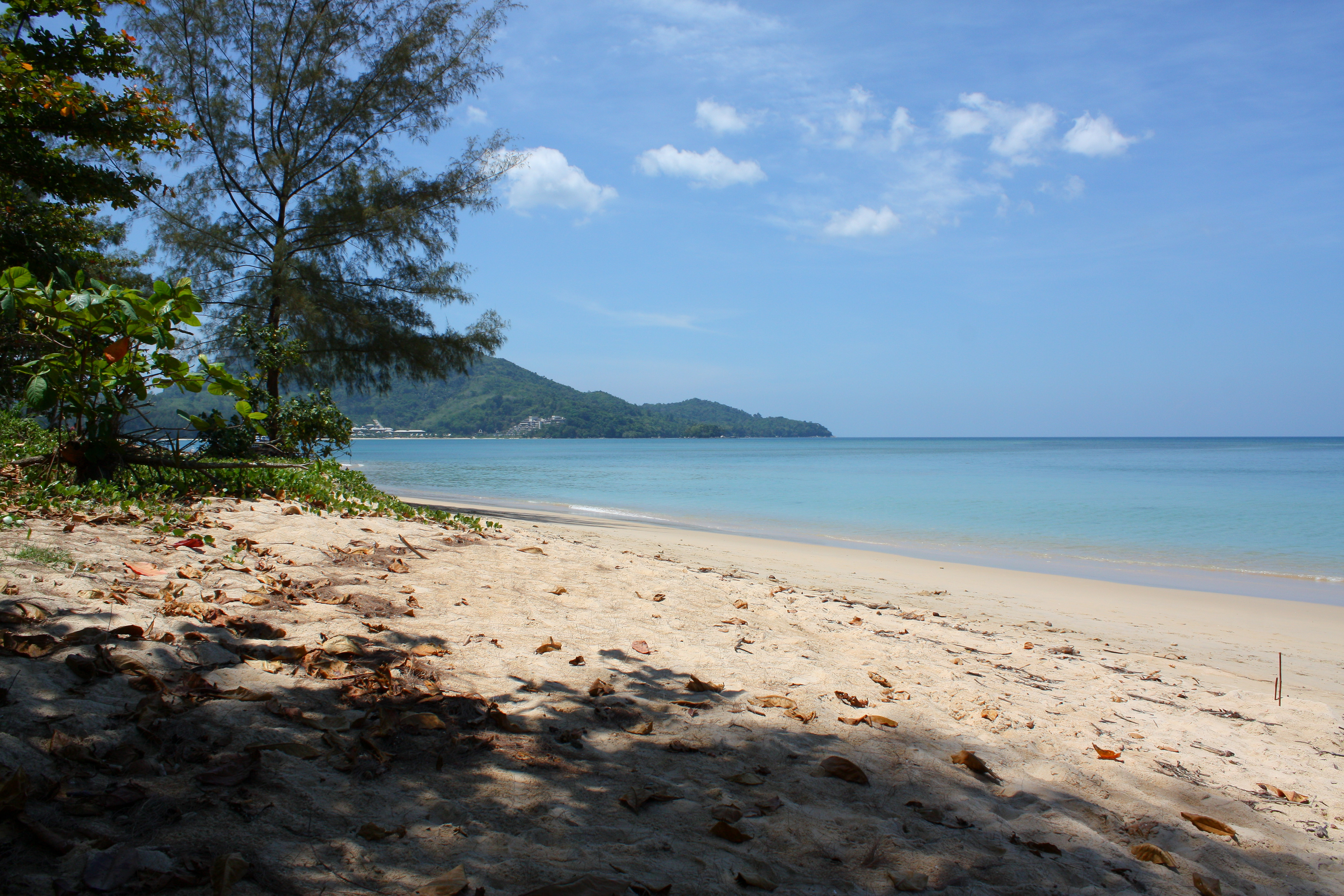 Nai Yang Beach, Phuket